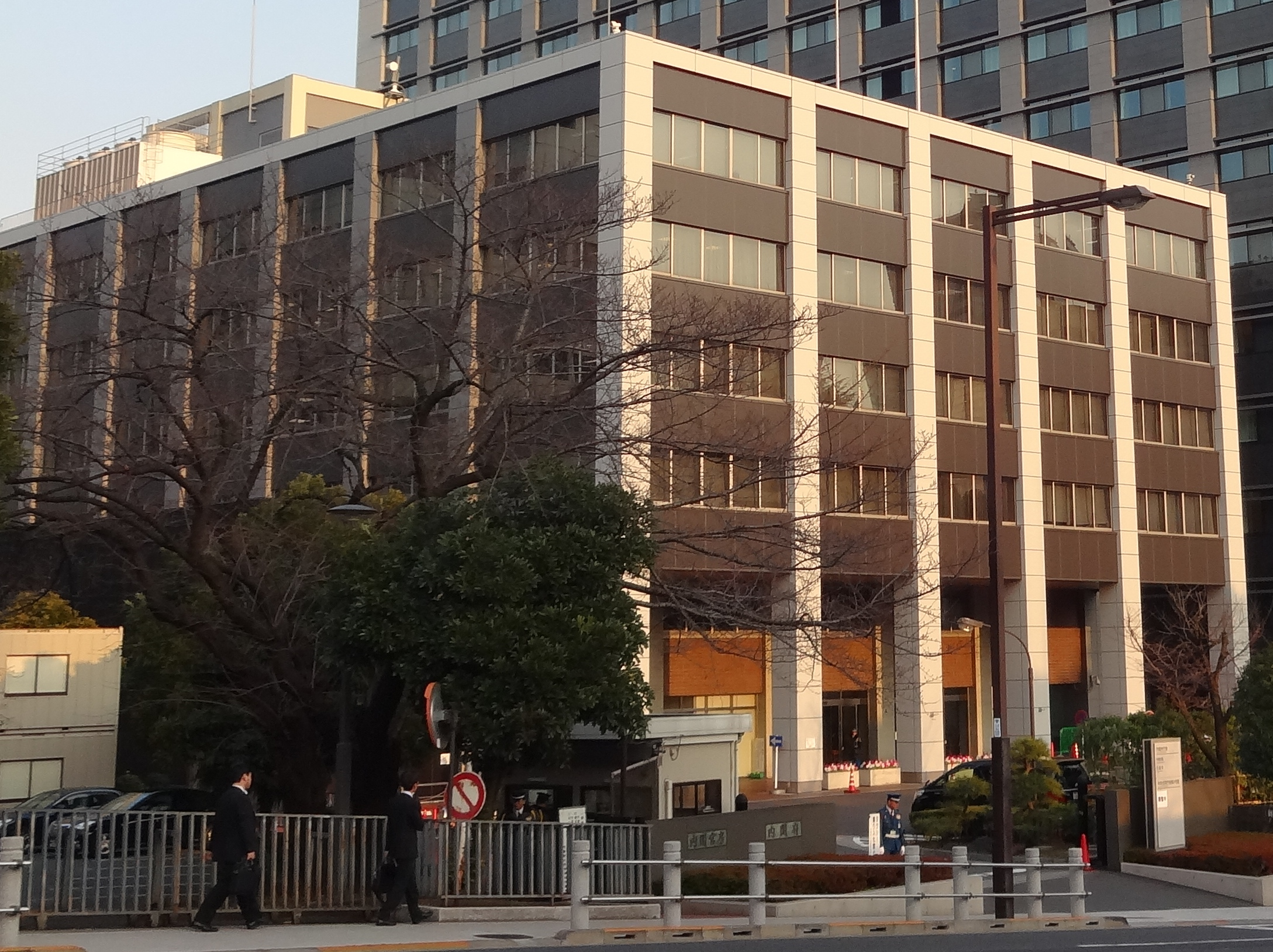 内閣府庁舎の外観。